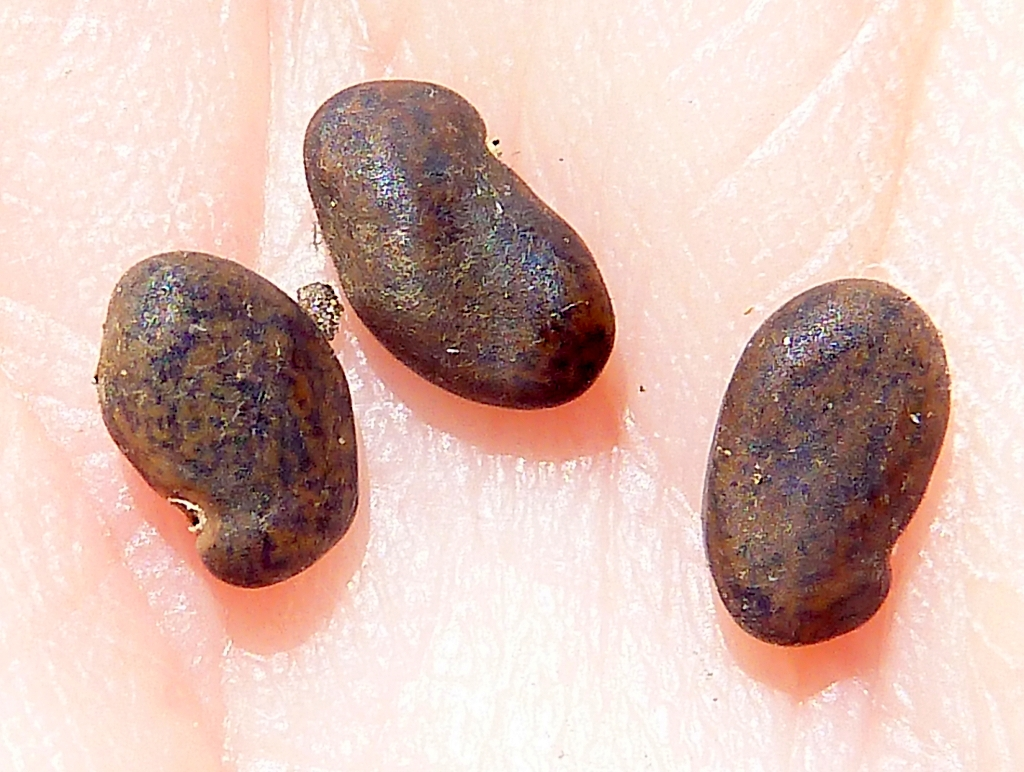 Robinia pseudoacacia (Robinia) : Semillas sueltas - Calle del Palacio, Nuevo Baztán, Provincia de Madrid (España).